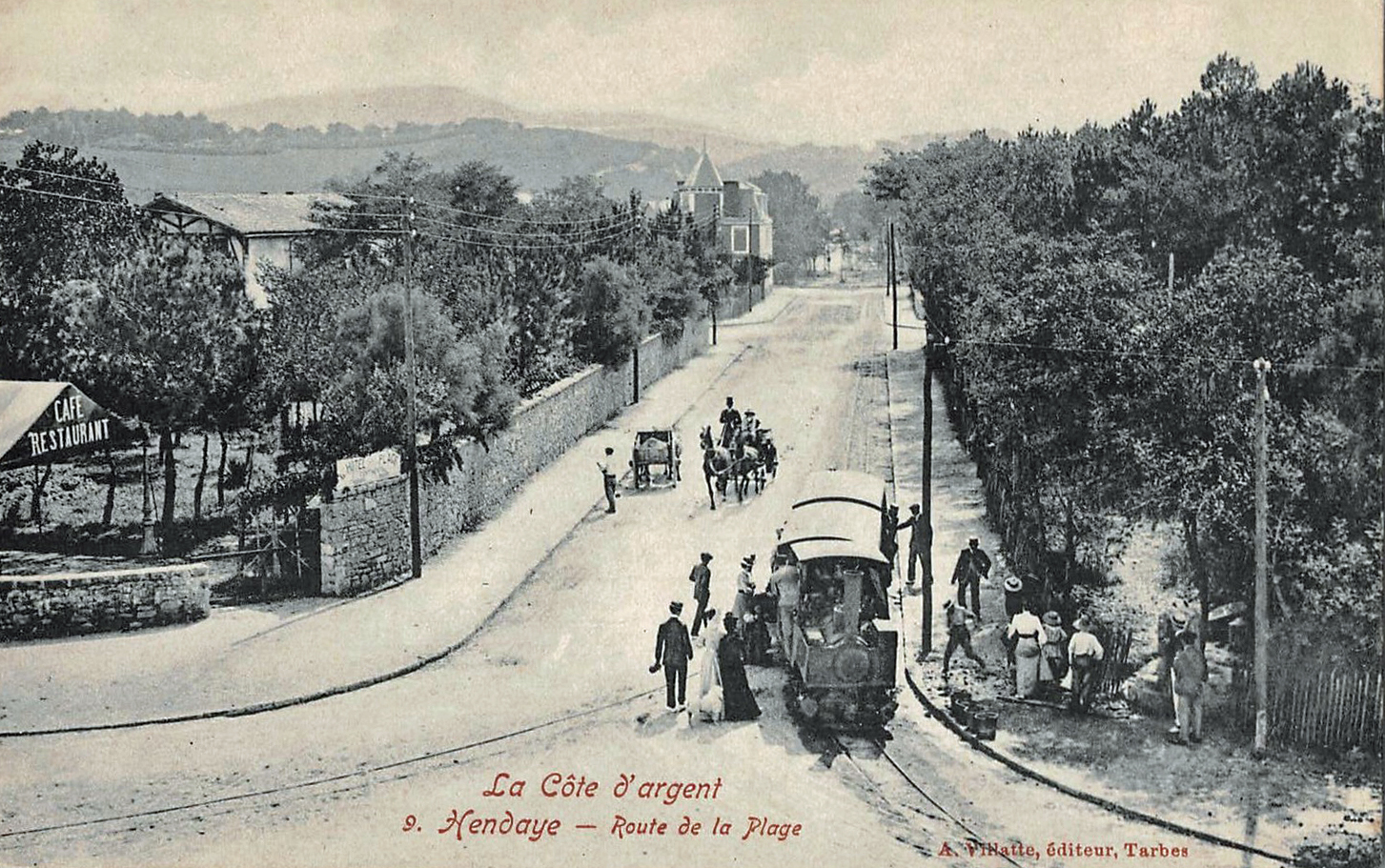 La Cote d'argent - Hendaye - Route de la Plage